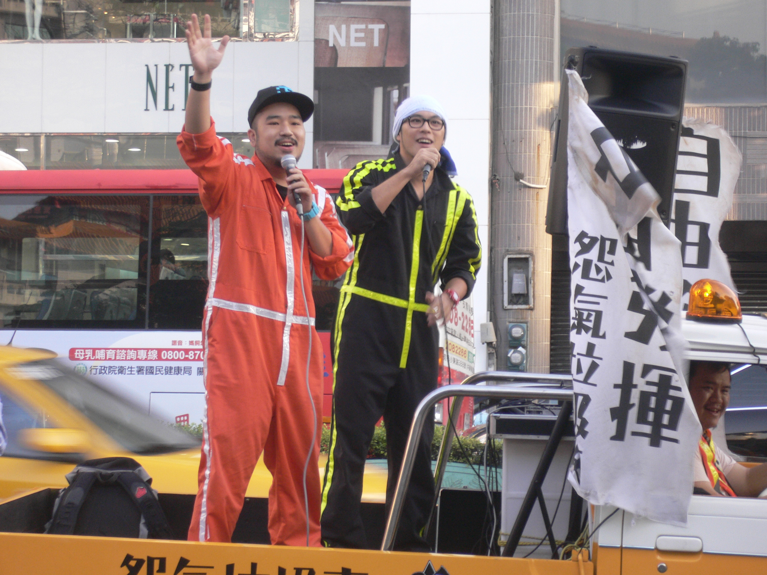 自由發揮在前去Lollipop-F的《四度空間》台南簽唱會探班